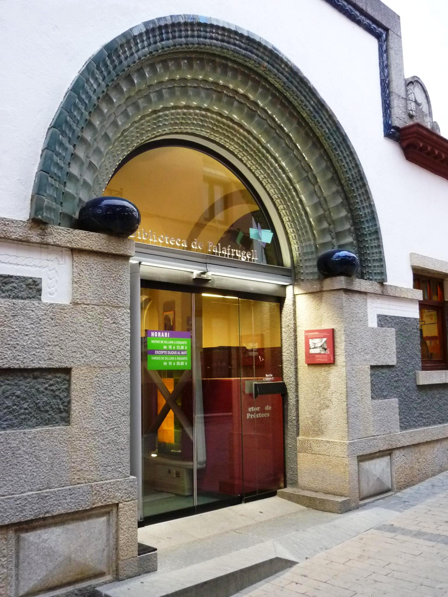 Edifici de planta baixa